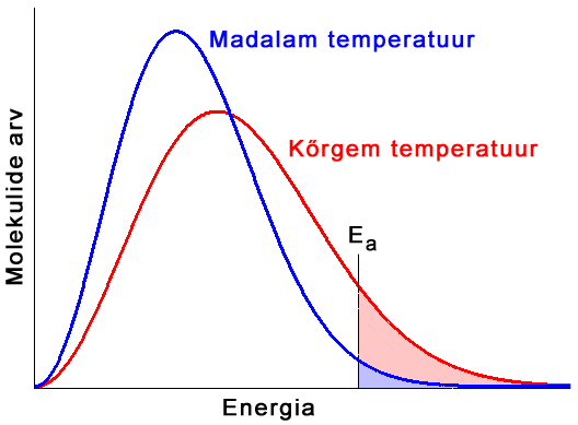 Molekulide kineetilise energia jaotus kahel erineval temperatuuril